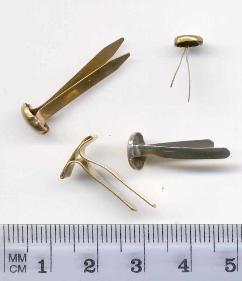 Musterklammer, scanned by Stefan Richter 2005-05-06, see Musterklammer